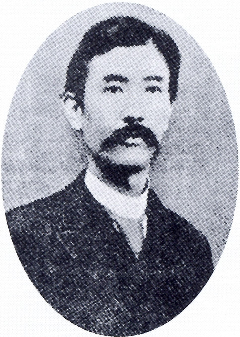 柳沢光邦の肖像写真。